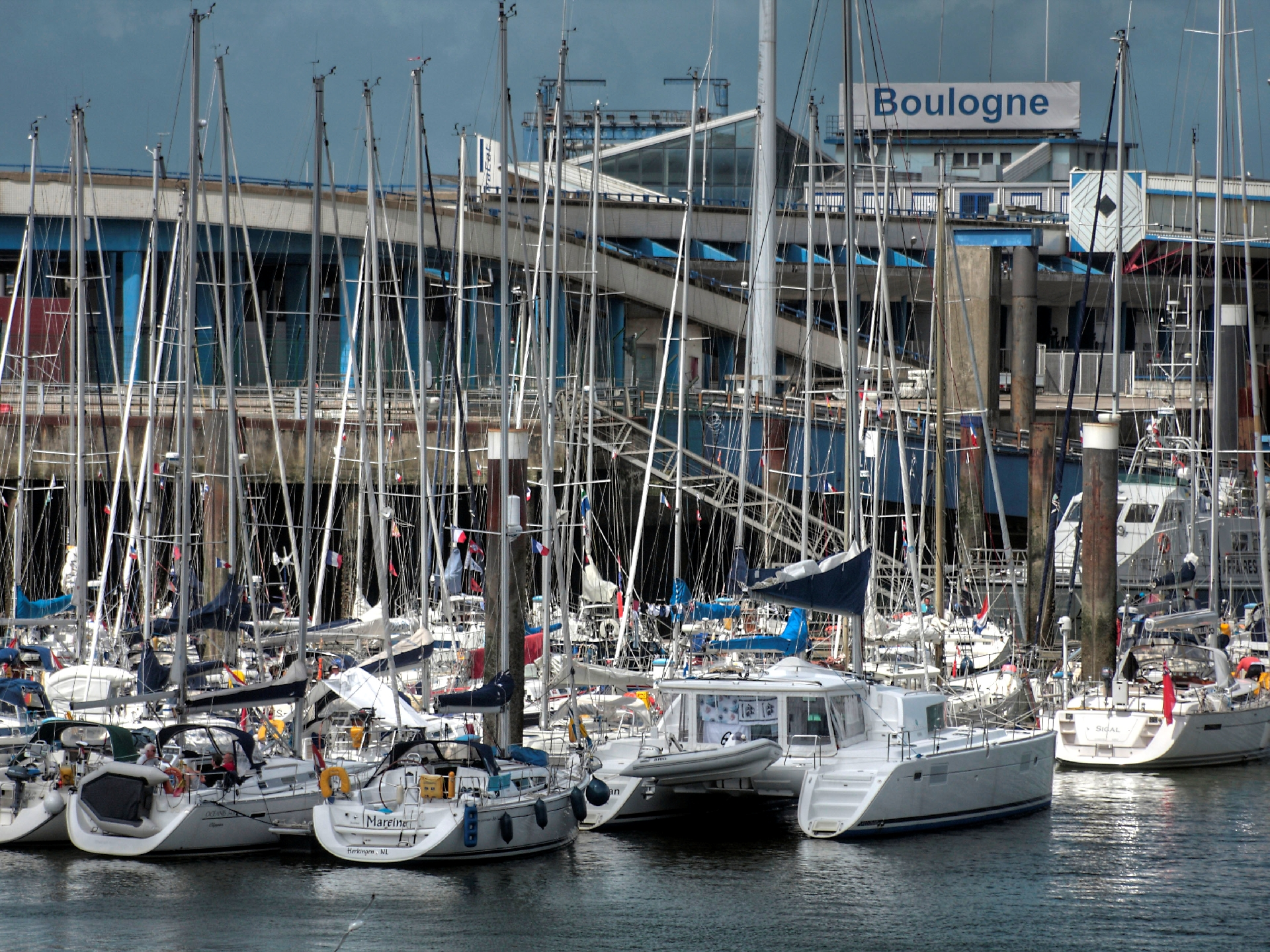 Le port de plaisance de Boulogne-sur-Mer